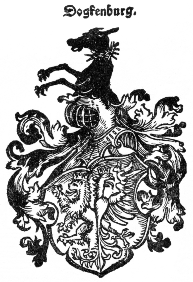 Wappen des Adelsgeschlechts der Toggenburger, Holzschnitt aus der Stumpfschen Chronik 1548